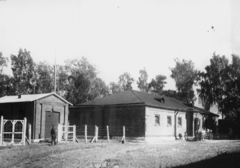 Garnizon Przasnysz, 1921r. Magazyny 3 szwadronu z 7 Pułku Ułanów Legionowych